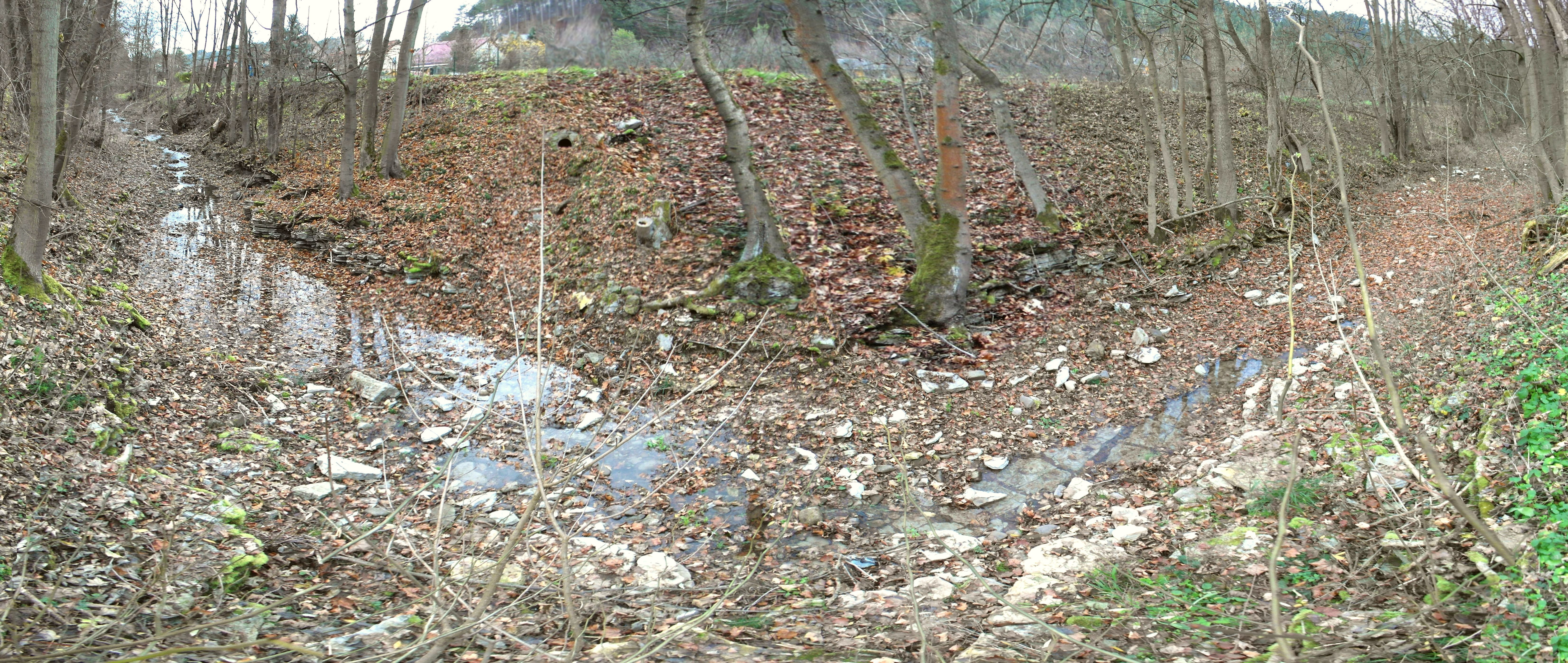 Wilde Gera Versickerung am Ortsausgang von Liebenstein 10.11.2015. Am Wehr von Liebenstein zeigte die Wilde Gera noch volle Wasserführung, um innerhalb 200 m vollständig durch gut sichtbare Spalten im Untergrund zu versickern.